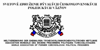 Znak Svetového združenia bývalých čsl. politických väzňov